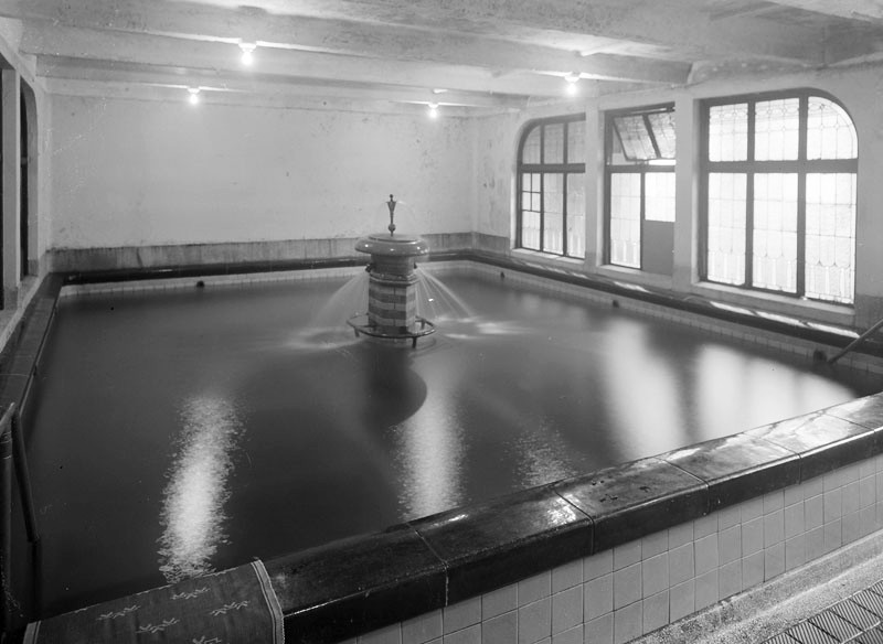 Interiör från Söderbadet, Badstugatan 4